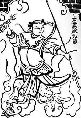 Тай-Суй, бог времениБог времени из китайской мифологии, гравюра